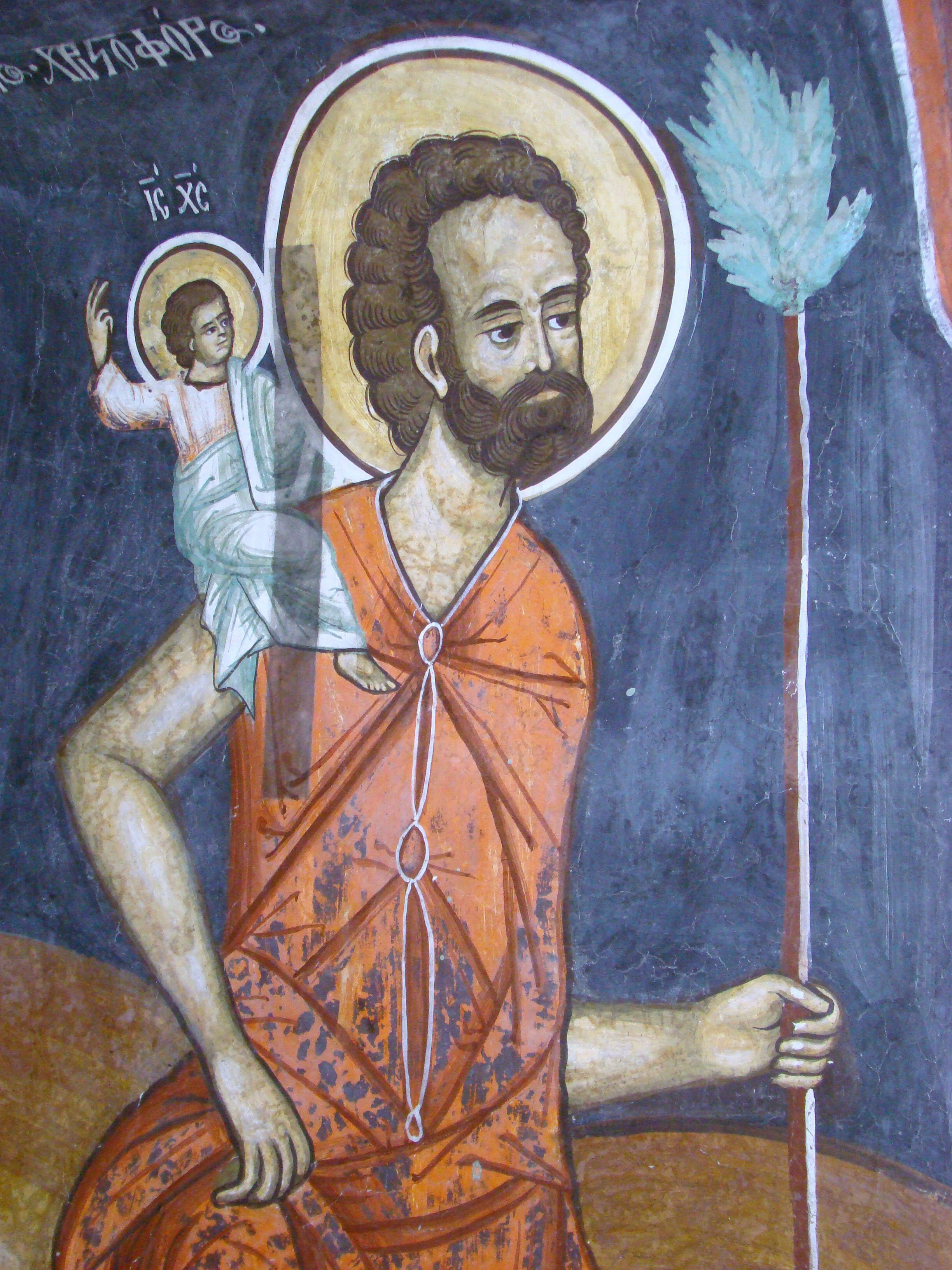 Mănăstirea Polovragi, județul Gorj